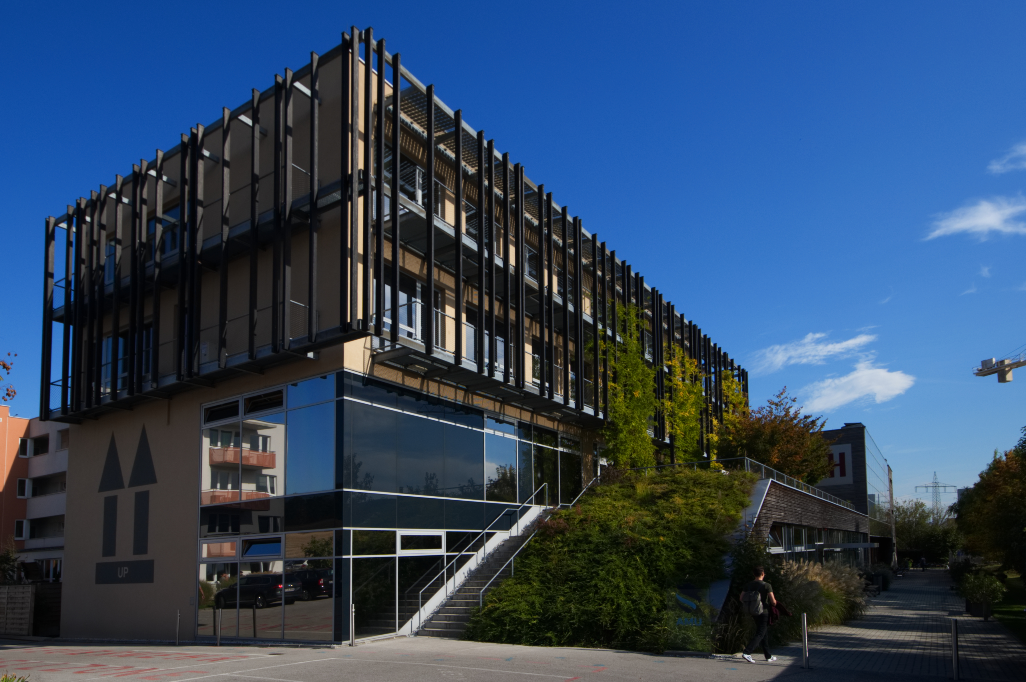 Campus Wieselburg, Zeiselgraben der FH Wiener Neustadt